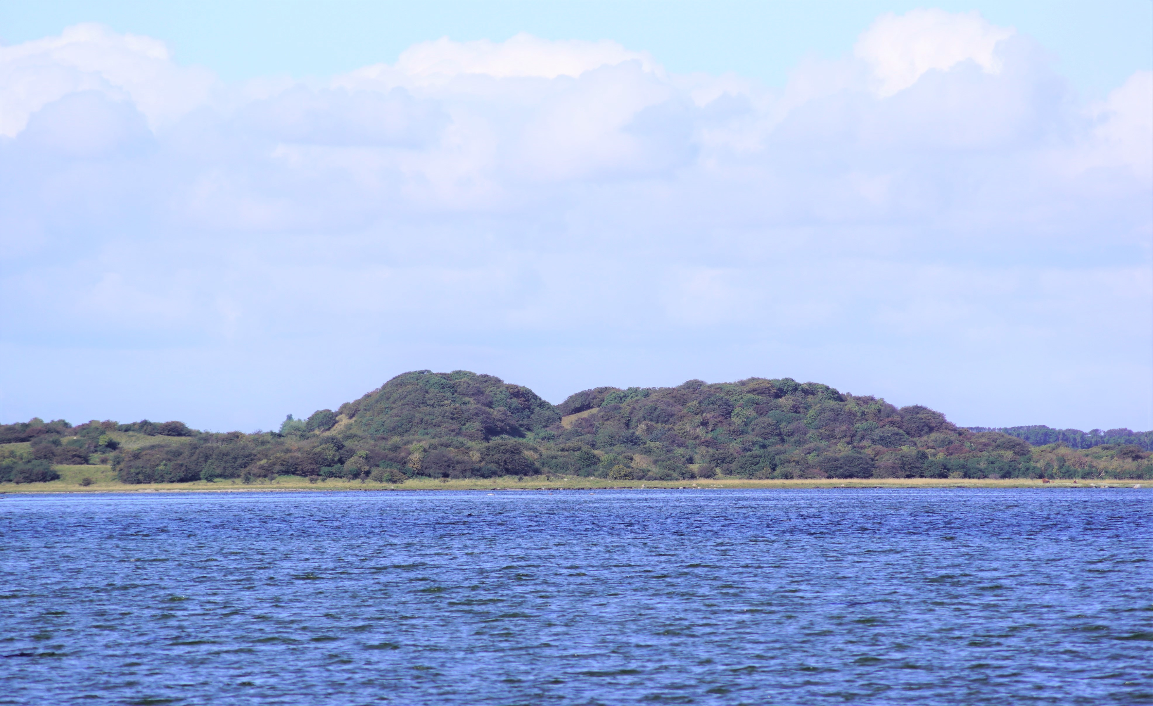 Hjortholm Stavns Fjord set fra Besser Rev